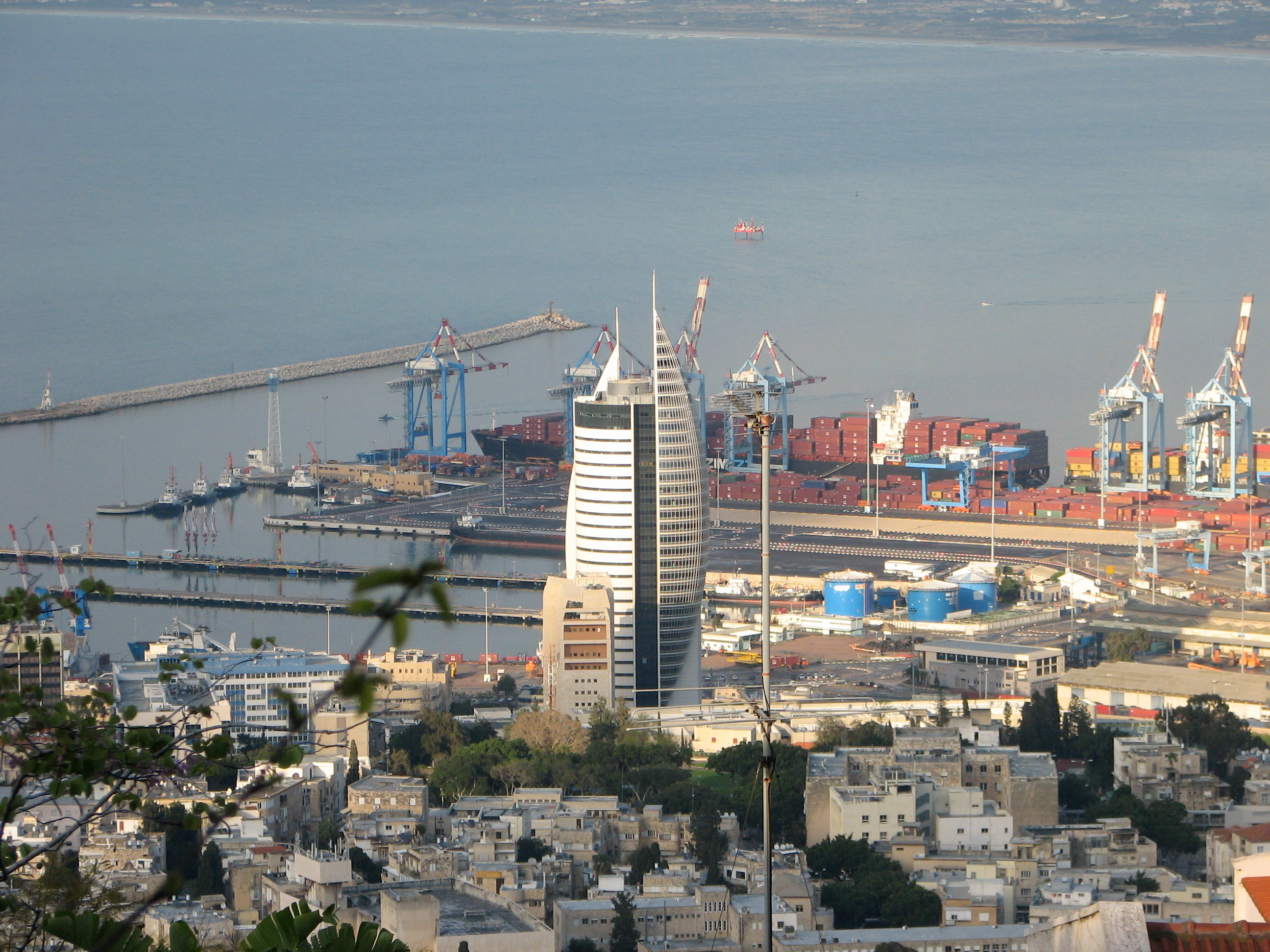 View from Hotels in Haifa on Mount Carmel, Israel. Haifa Bay, Haifa Port, View on Acre across the Bay and Rosh Hanikra on the border of Lebanon מראות מהר הכרמל בחיפה , נוף הנשקף מאזור המלונות רחוב יפה נוף, נמל חיפה, מפרץ חיפה, עכו והקריות מעבר למפרץ ולעיתים גם ראש הנקרה הנמל ומגדל המפרש במרכזו